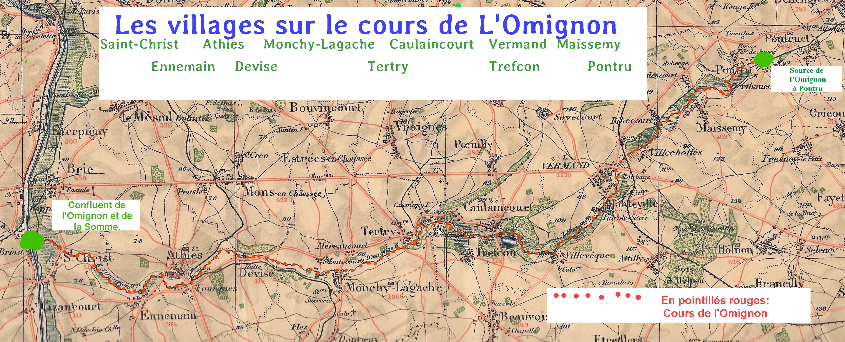 Le cours de l'Omignon sur la Carte d'Etat-Major de 1907.